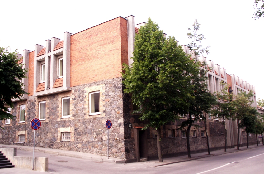 Šiaulių teismas